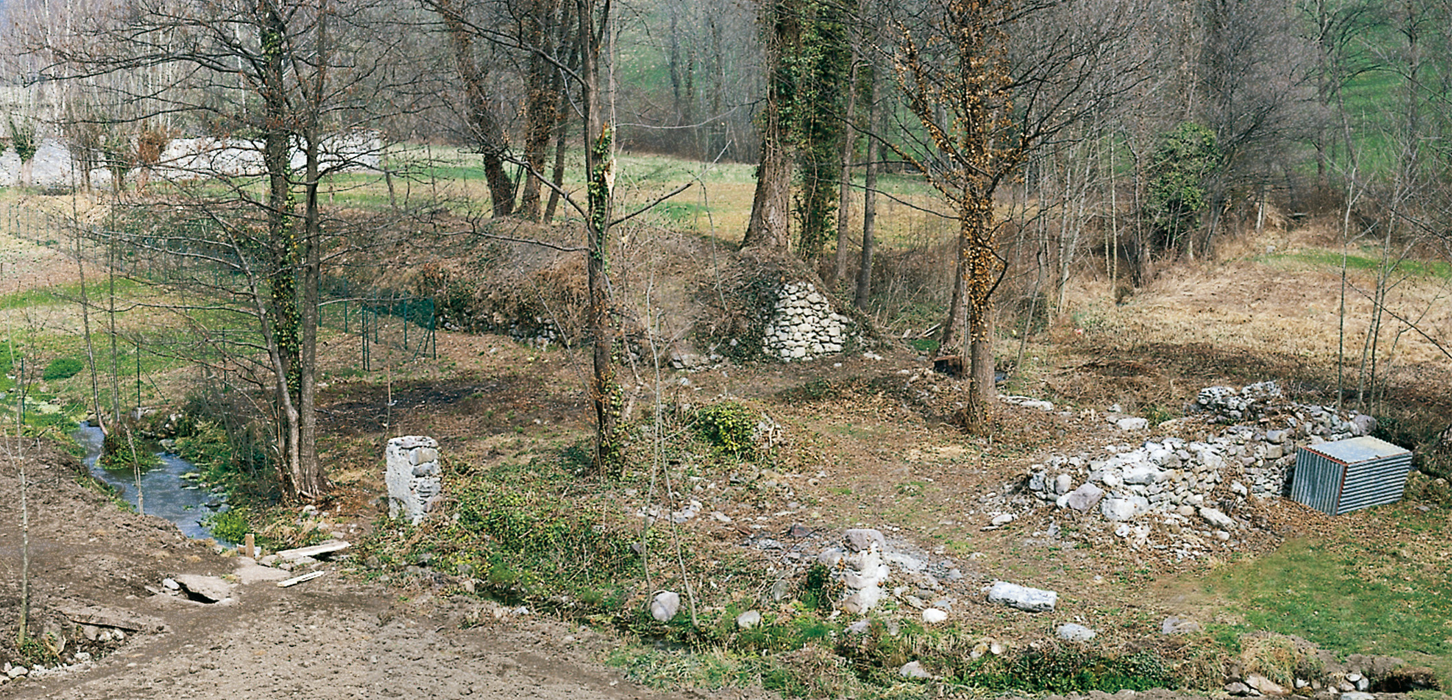 Rudere di pestello da corteccia a Cerete Basso